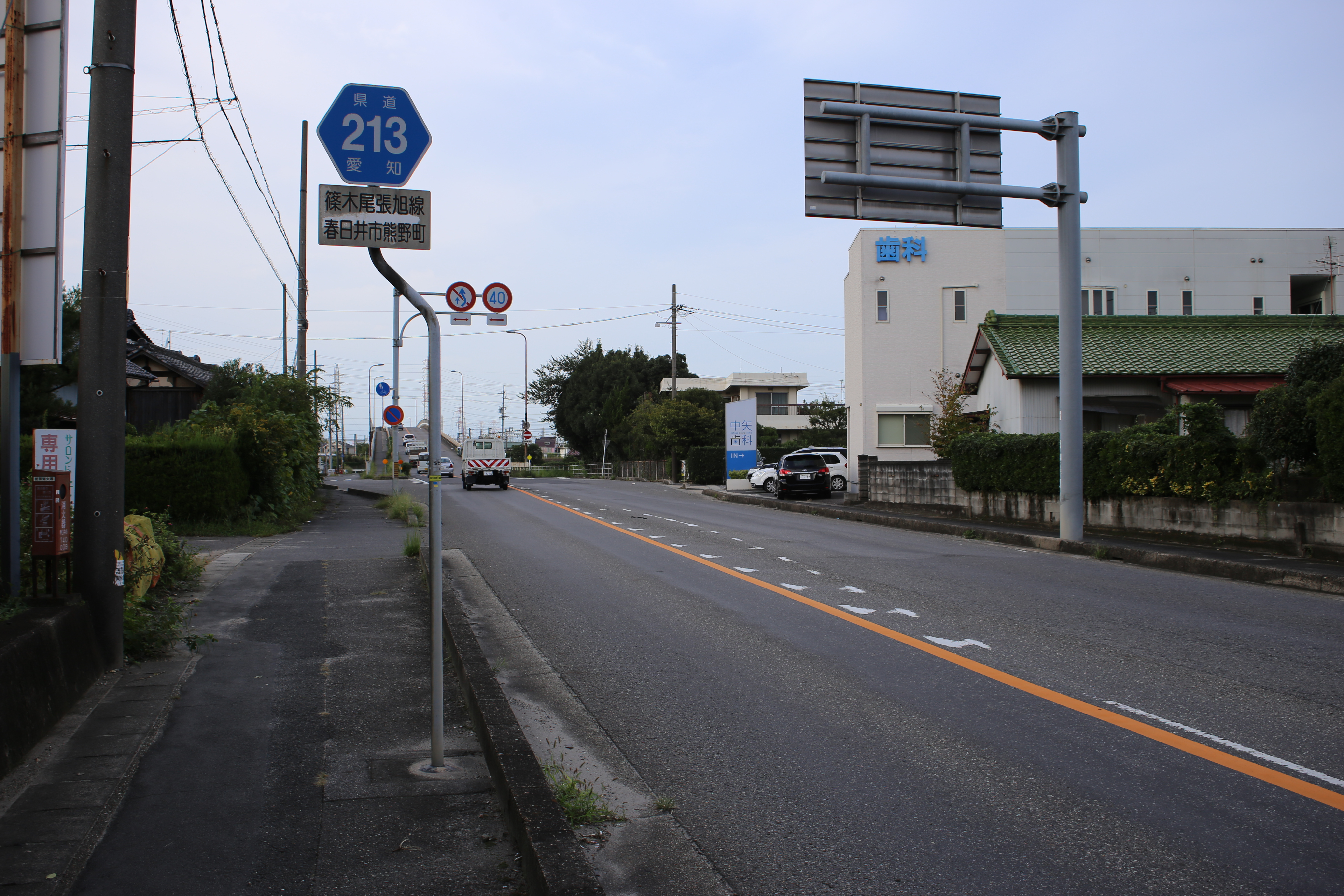 愛知県春日井市熊野町の愛知県道213号篠木尾張旭線